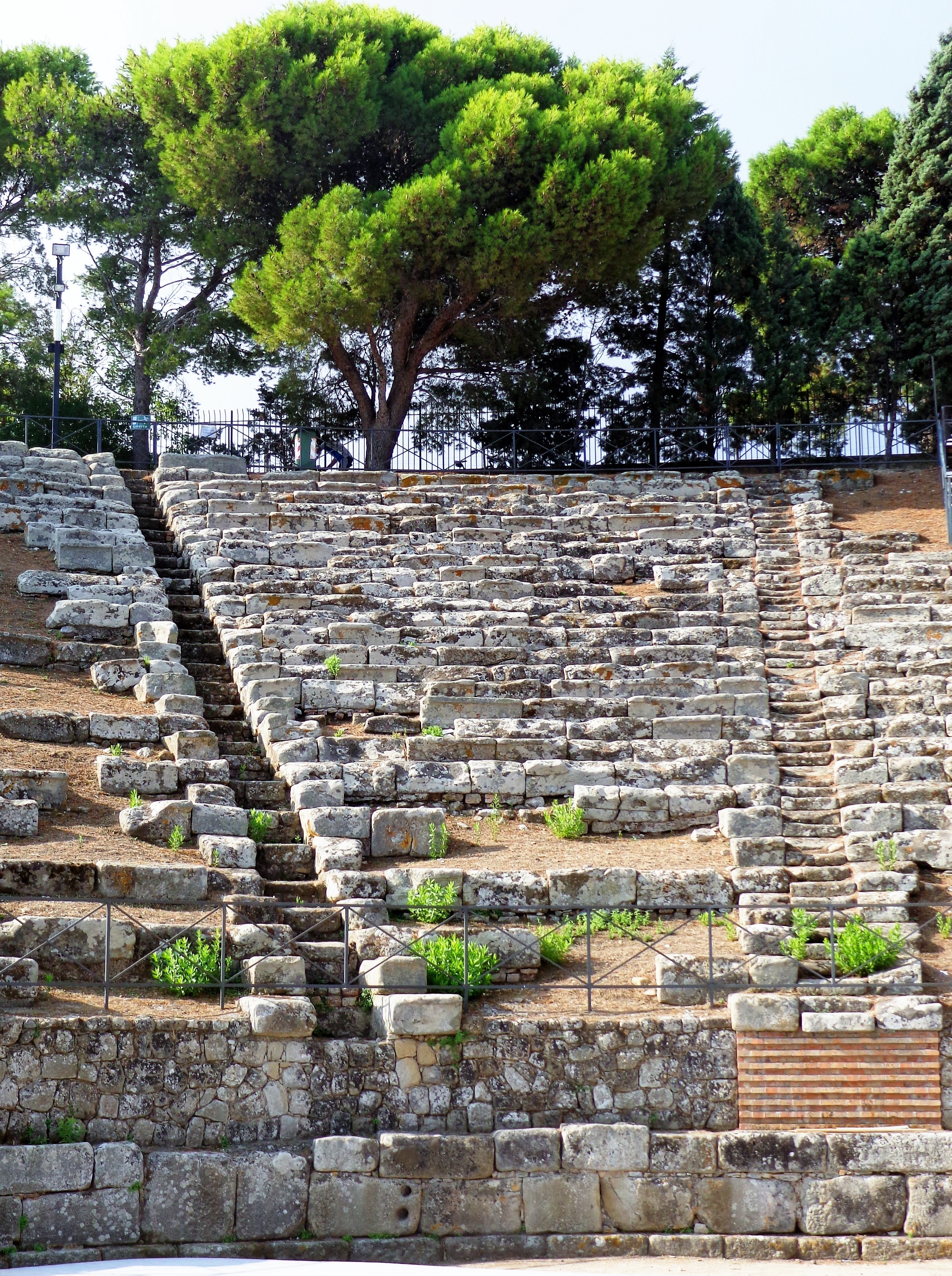 Teatro - settori. 08 settembre 2012 (Escursione Tindari, Santuario e area archeologica). Scatto fotografico altresì presente negli album caricati sui profili personali di Facebook, Panoramio, Google, etc.